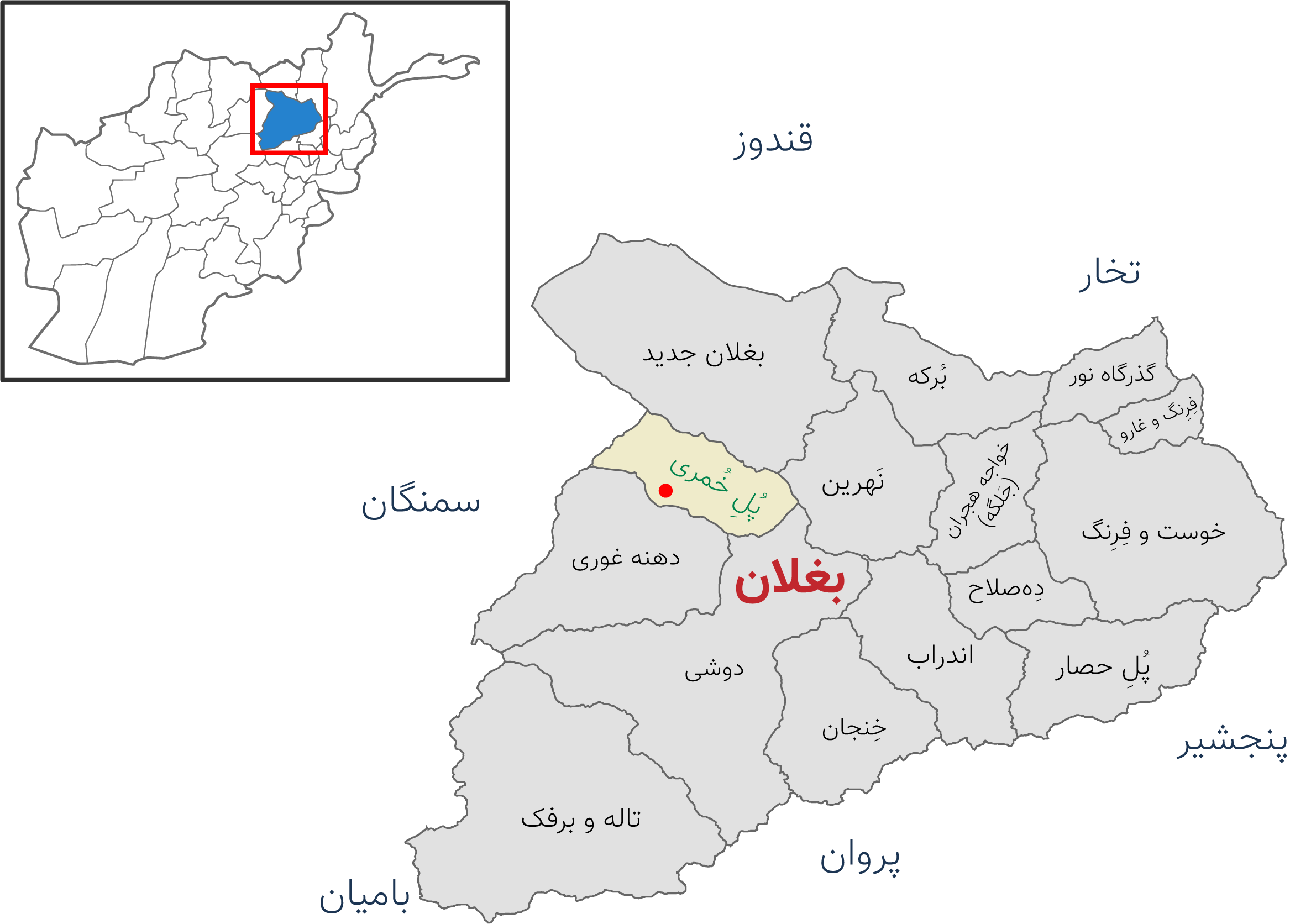 نقشه ولایت بغلان